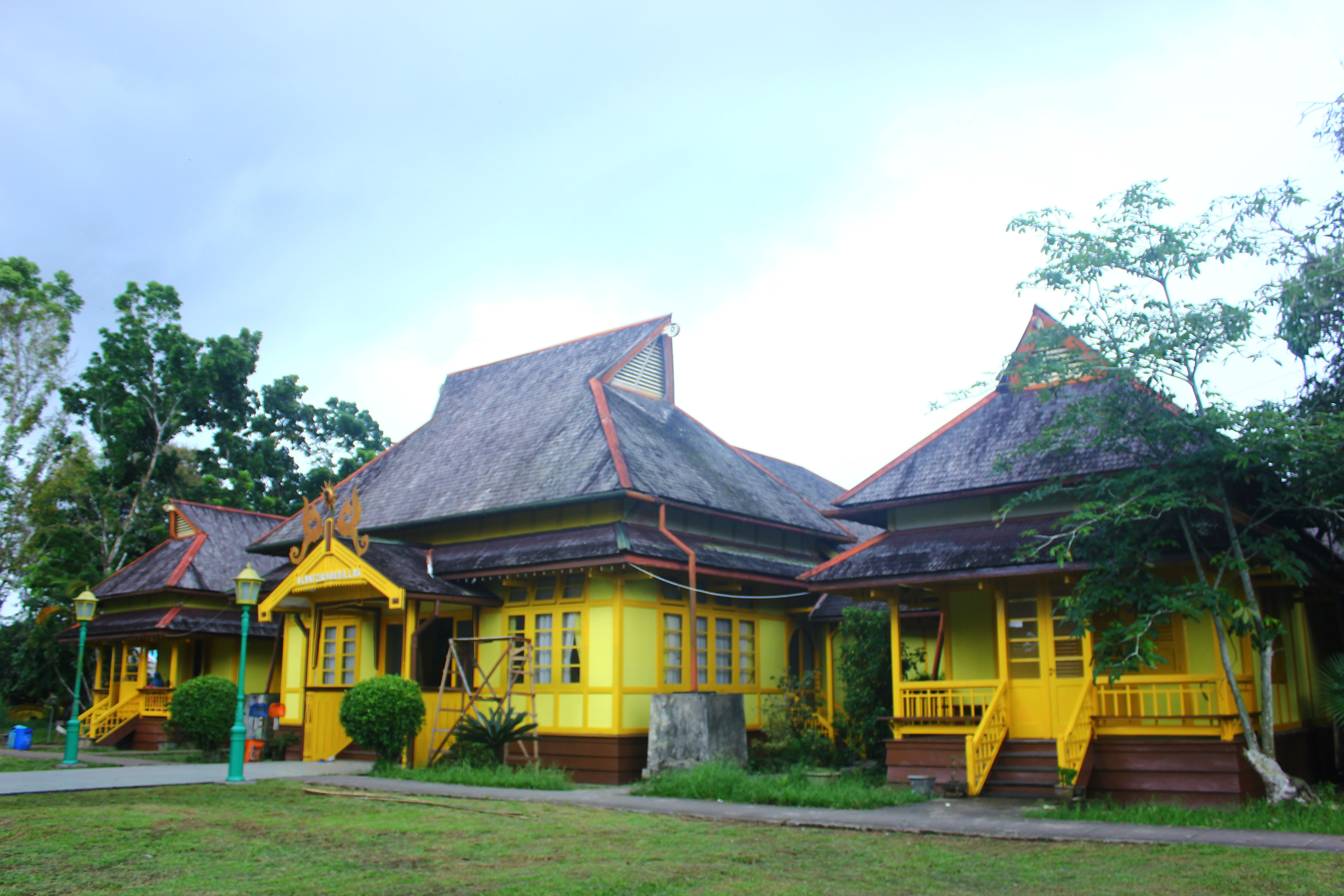 Istana Alwatzikoebillah merupakan istana Kesultanan Sambas yang menjadi pusat pemerintahan di Sambas hingga berakhirnya kekuasaan kesultanan.